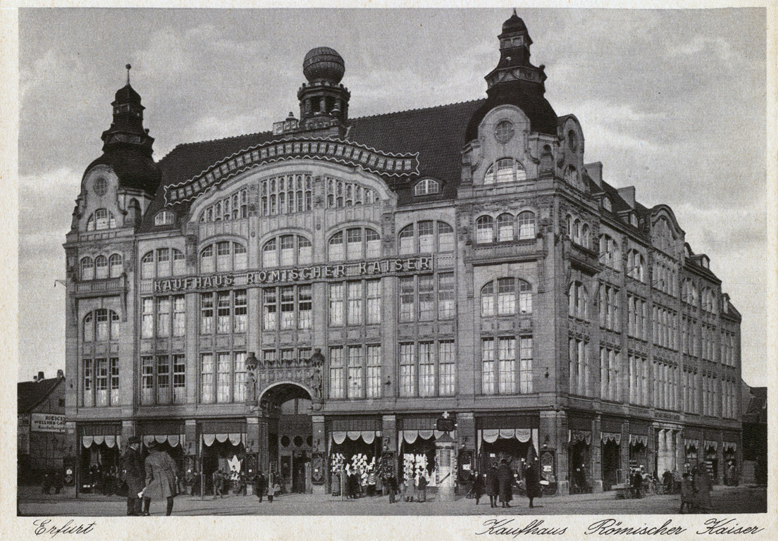 Kaufhaus Römischer Kaiser, am Anger in Erfurt